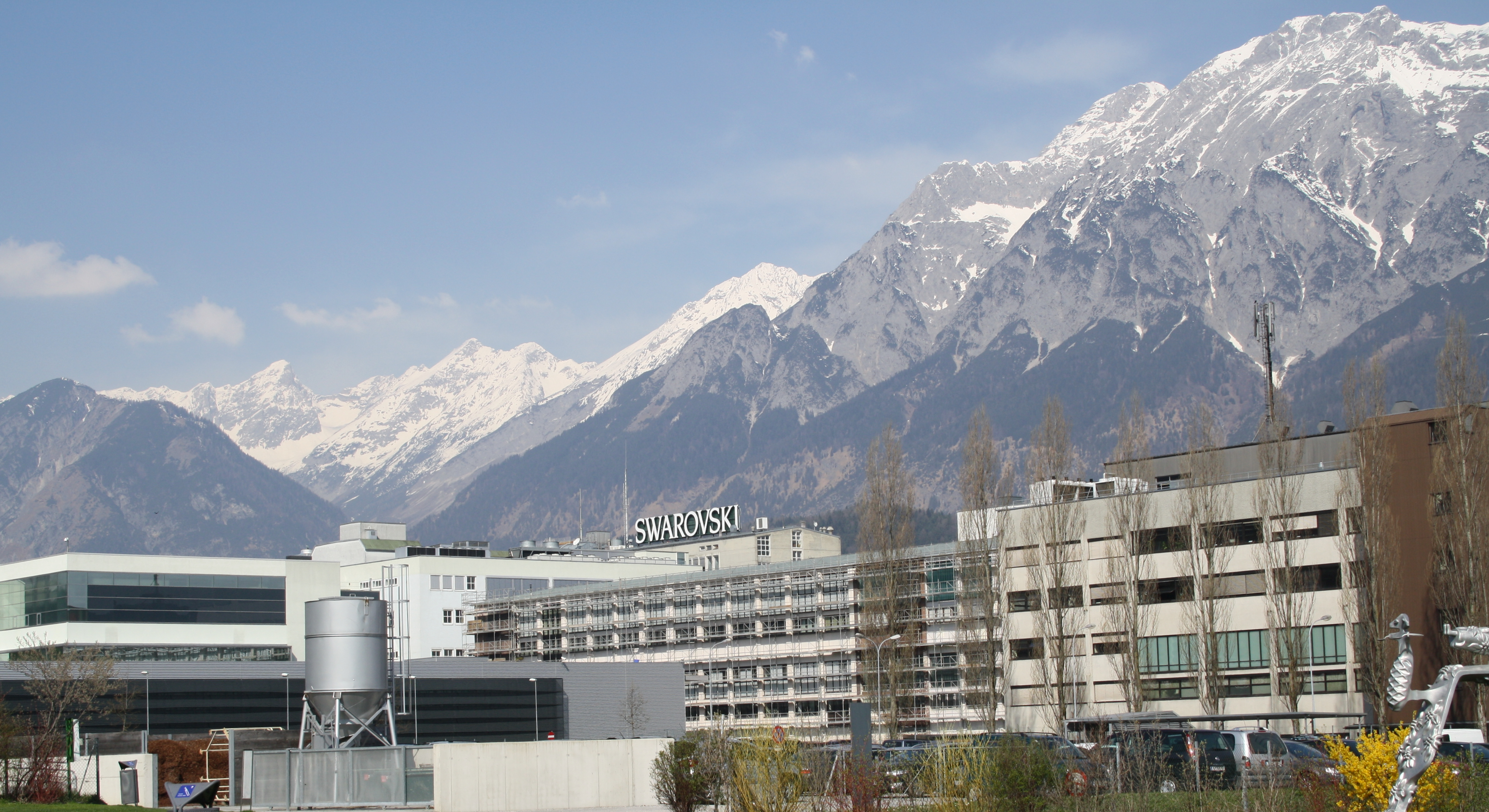 Swarovski in Wattens - Blick von den Kristallwelten auf die Produktionsbetriebe.